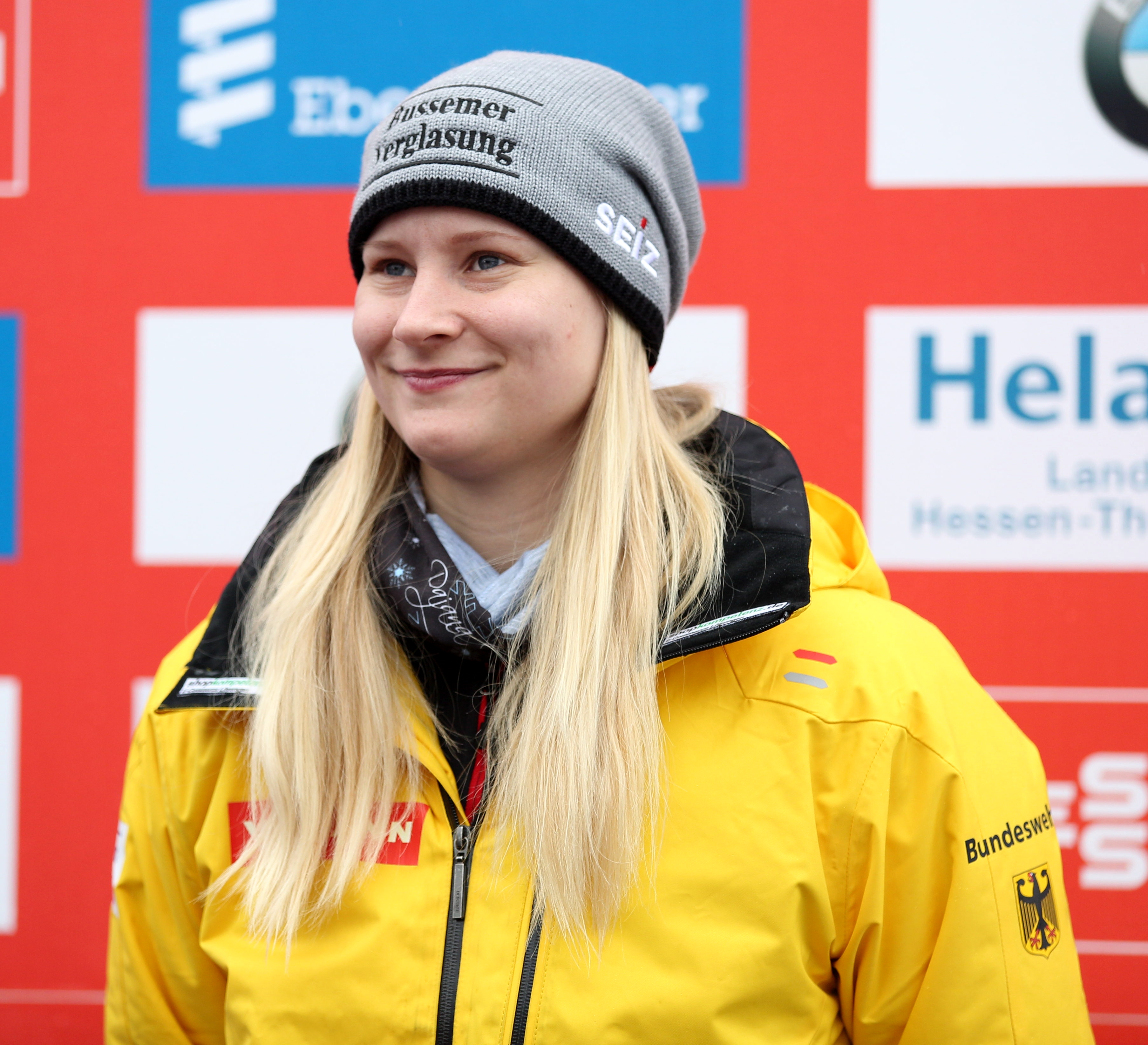 Dajana Eitberger beim HELABA Nationscup der Damen in Oberhof 2017